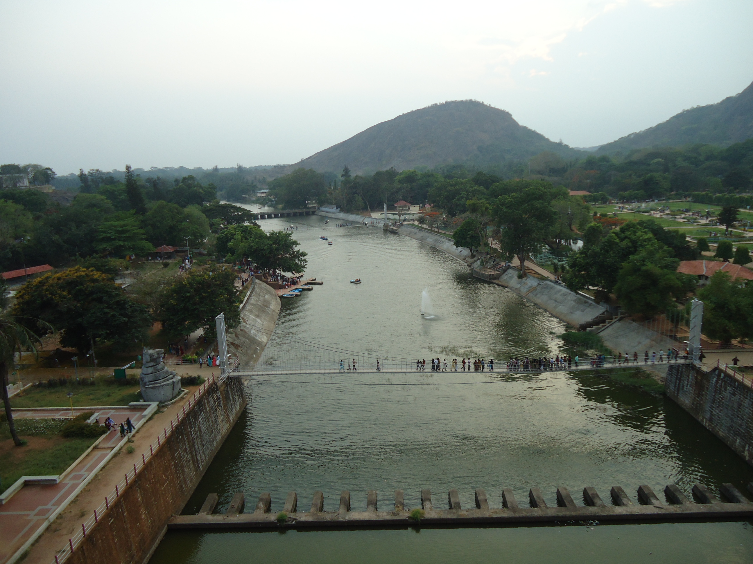 Malampuzha Dam River Top View